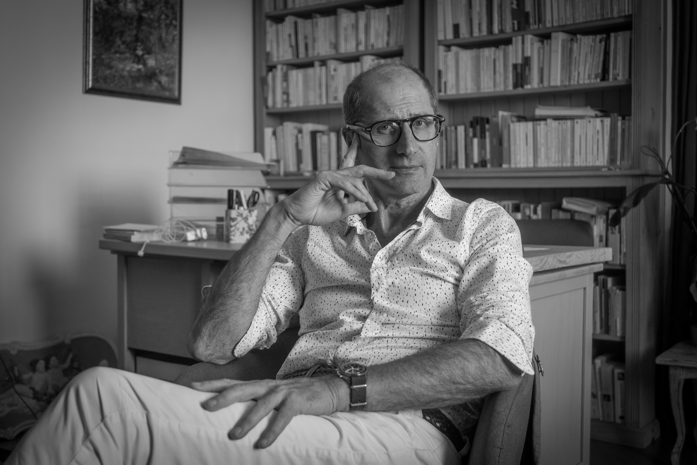 Didier Ben Loulou par Claude Truong-Ngoc août 2020